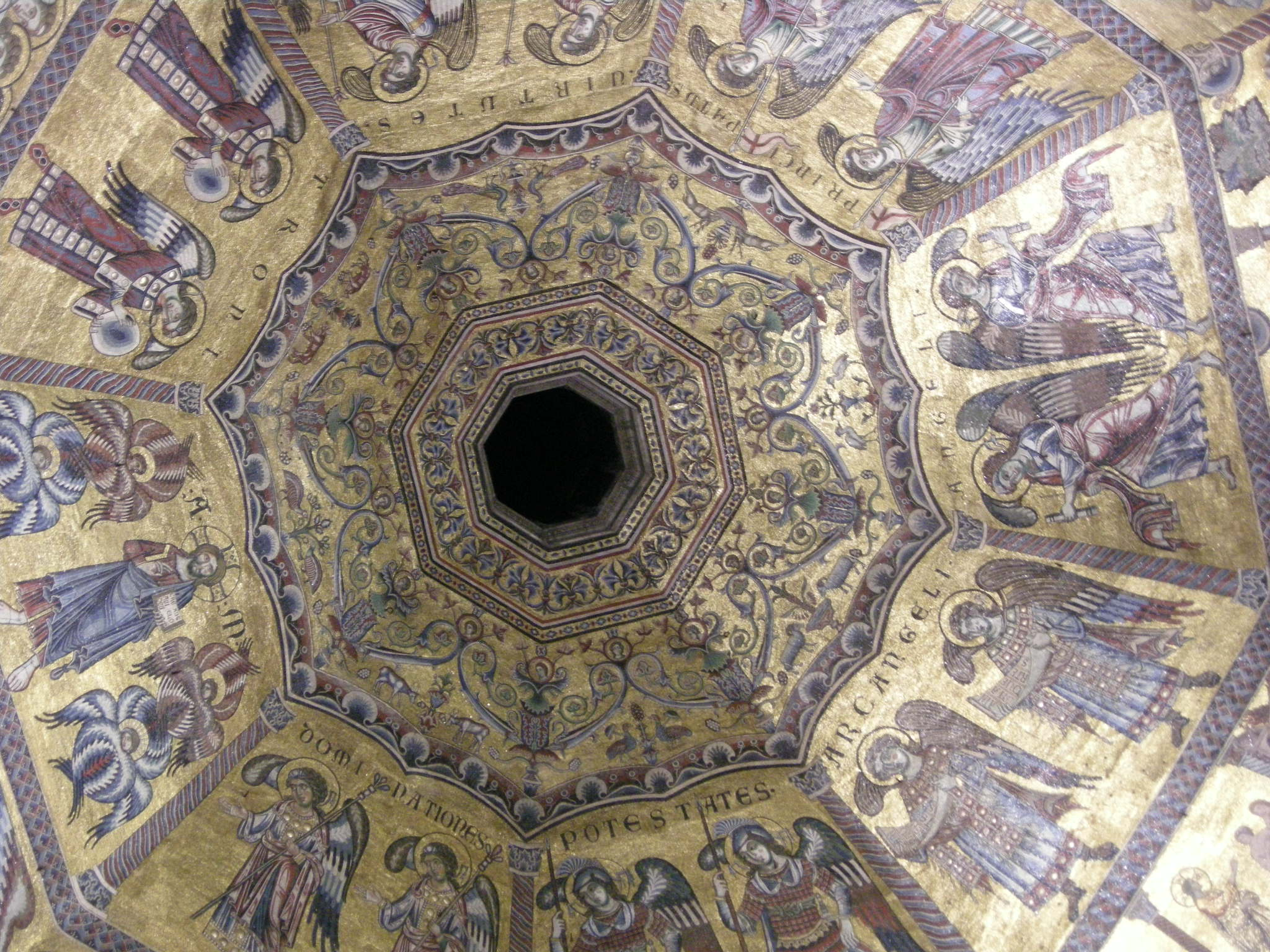 Battistero, mosaici